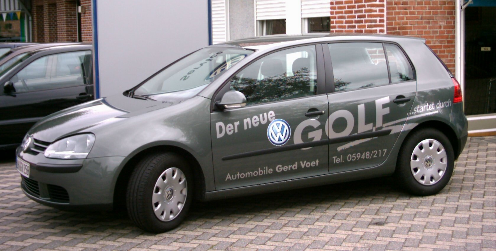 VolkswagenGolf-V-2004